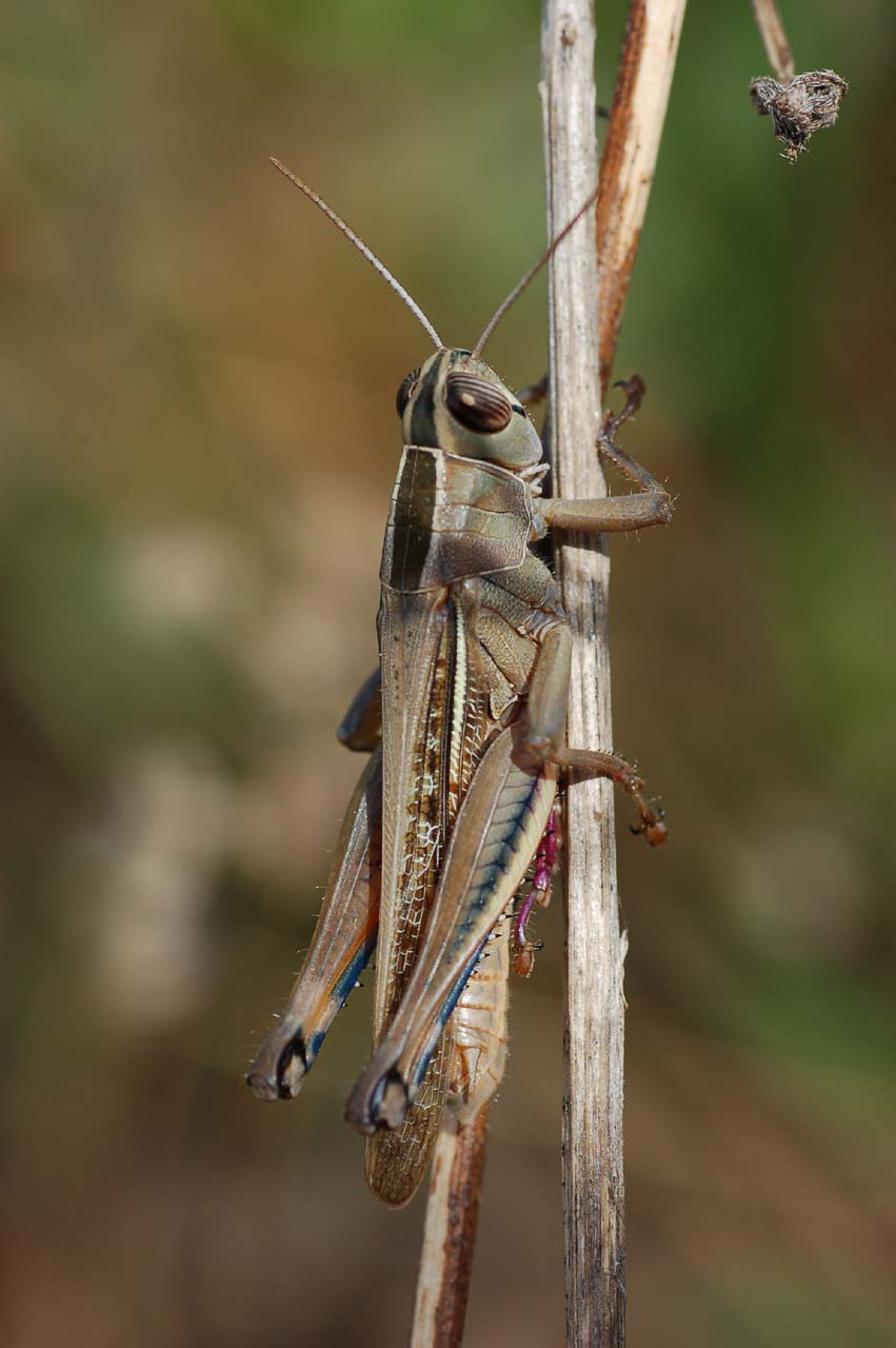 Llagost ploraner, a la platja de Sant Salvador, aprop la riera de la Bisbal, you can see more images in